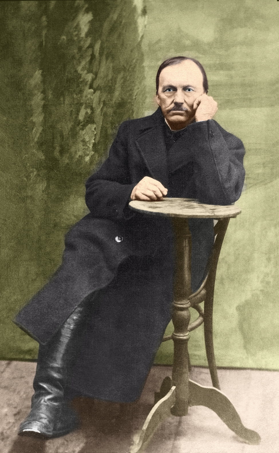 Fotografia ze zbiorów Muzeum Regionalnego w Krasnymstawie, udostępniona przez dyrektora tej placówki do "Poetyckich Łanów. Kwartalnika Grupy Literackiej A4" nr 2/2007 ISSN 1896-9739; fotografia koloryzowana i retuszowana współcześnie